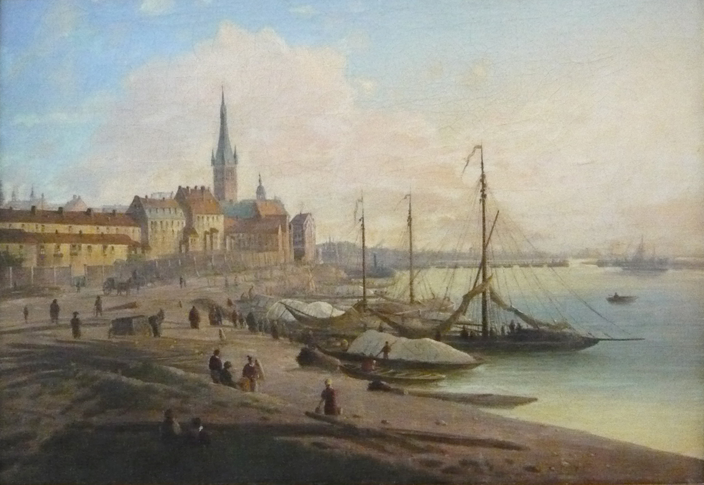 Stadtbild Düsseldorf von der Golzheimer Insel aus, um 1840, unbekannter Maler